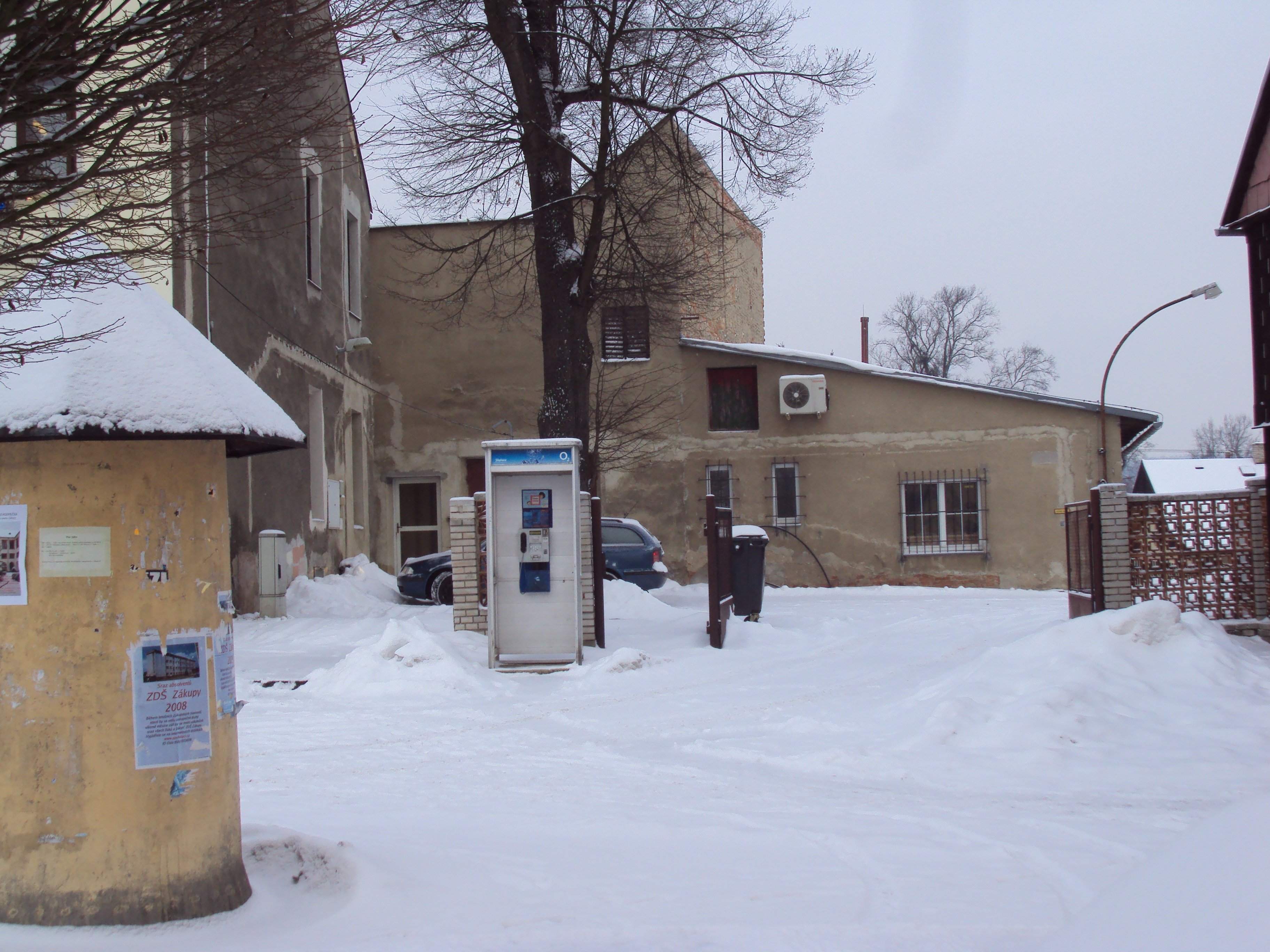 Přistavek za zákupskou radnicí, postaven 1952 tehdy pro hasiče